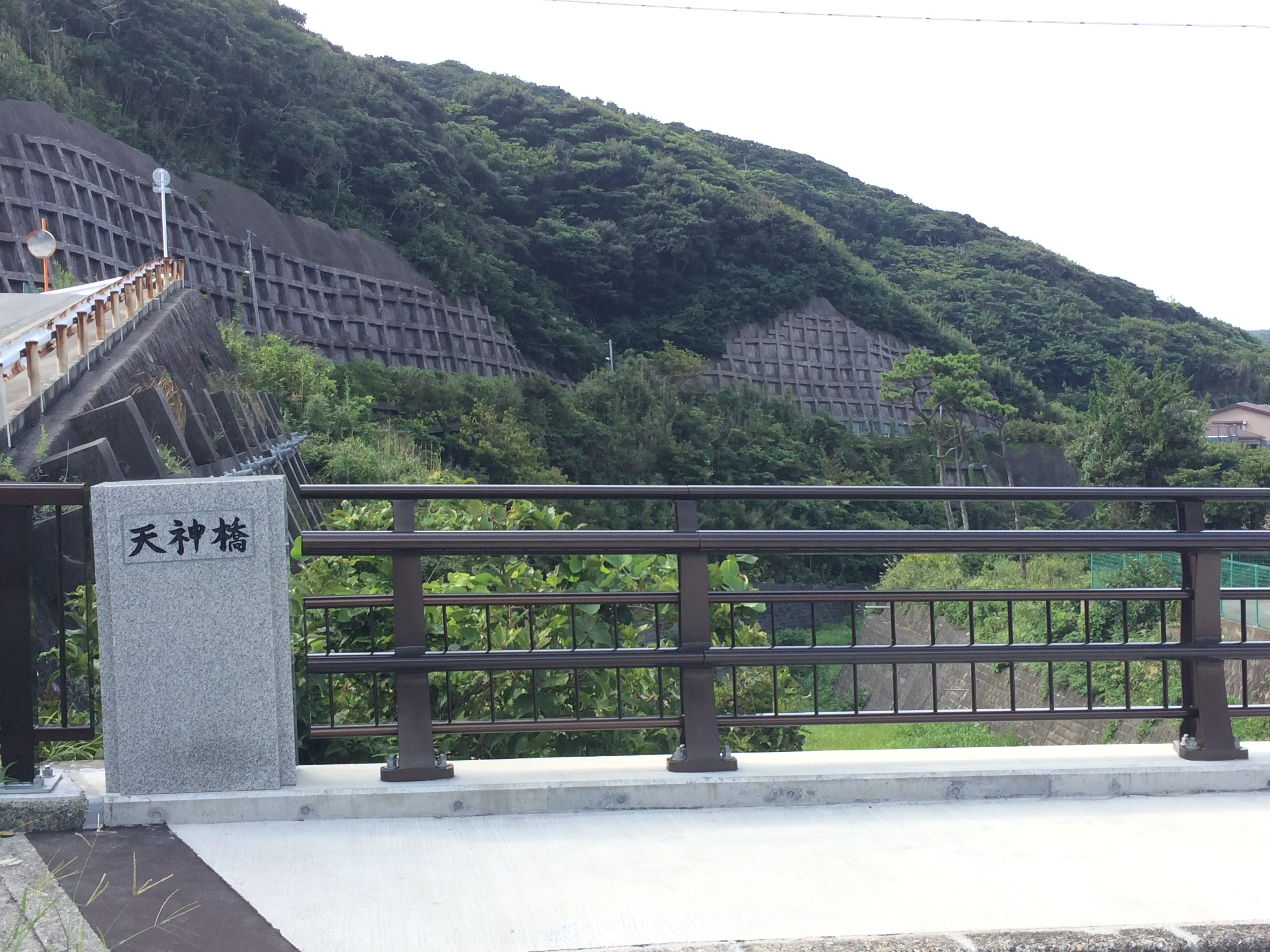 神津沢の上流近くにかかる橋